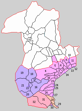 神奈川県足柄下郡の町村。